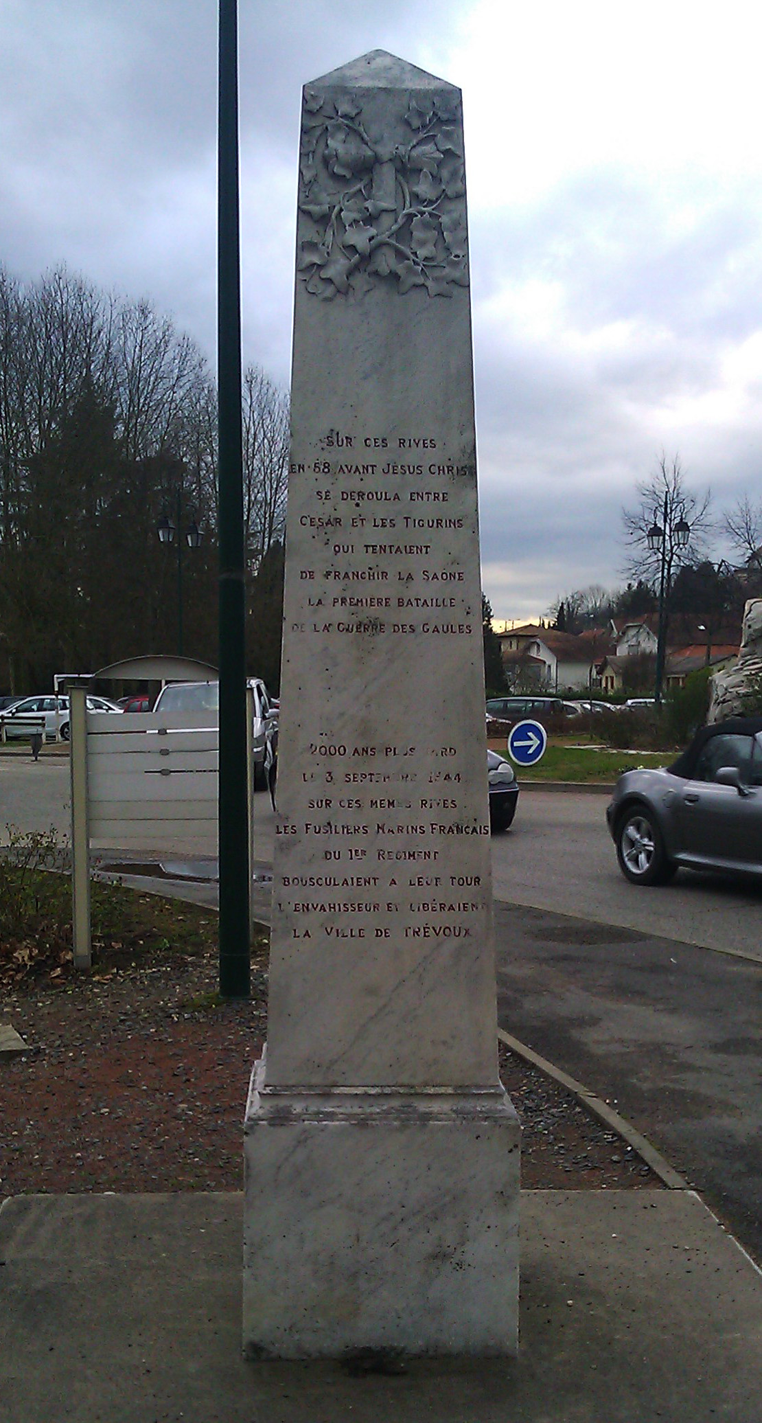 Monument aux 1er régiment de fusiliers marins, érigé à Trévoux, en mémoire de la libération de la ville, le 3 septembre 1944. Le texte se réfère à la première bataille de la Guerre des Gaules contre les Tigurins (Helvètes) qui se tint au même endroit.